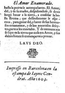 Obra de Jerónimo de Heredia